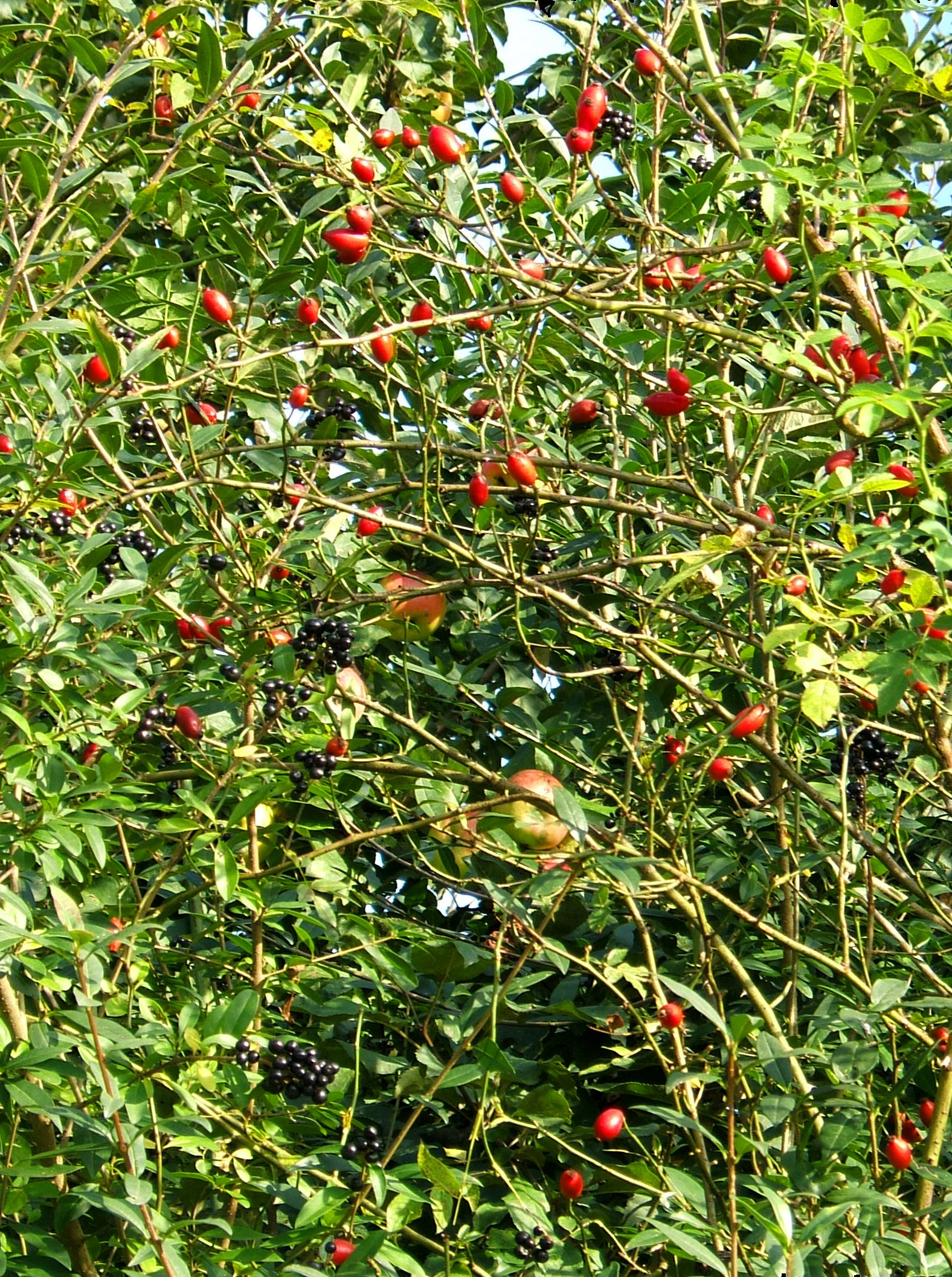 verwilderte Hagebutte-Liguster-Apfel-Hecke im Remstal